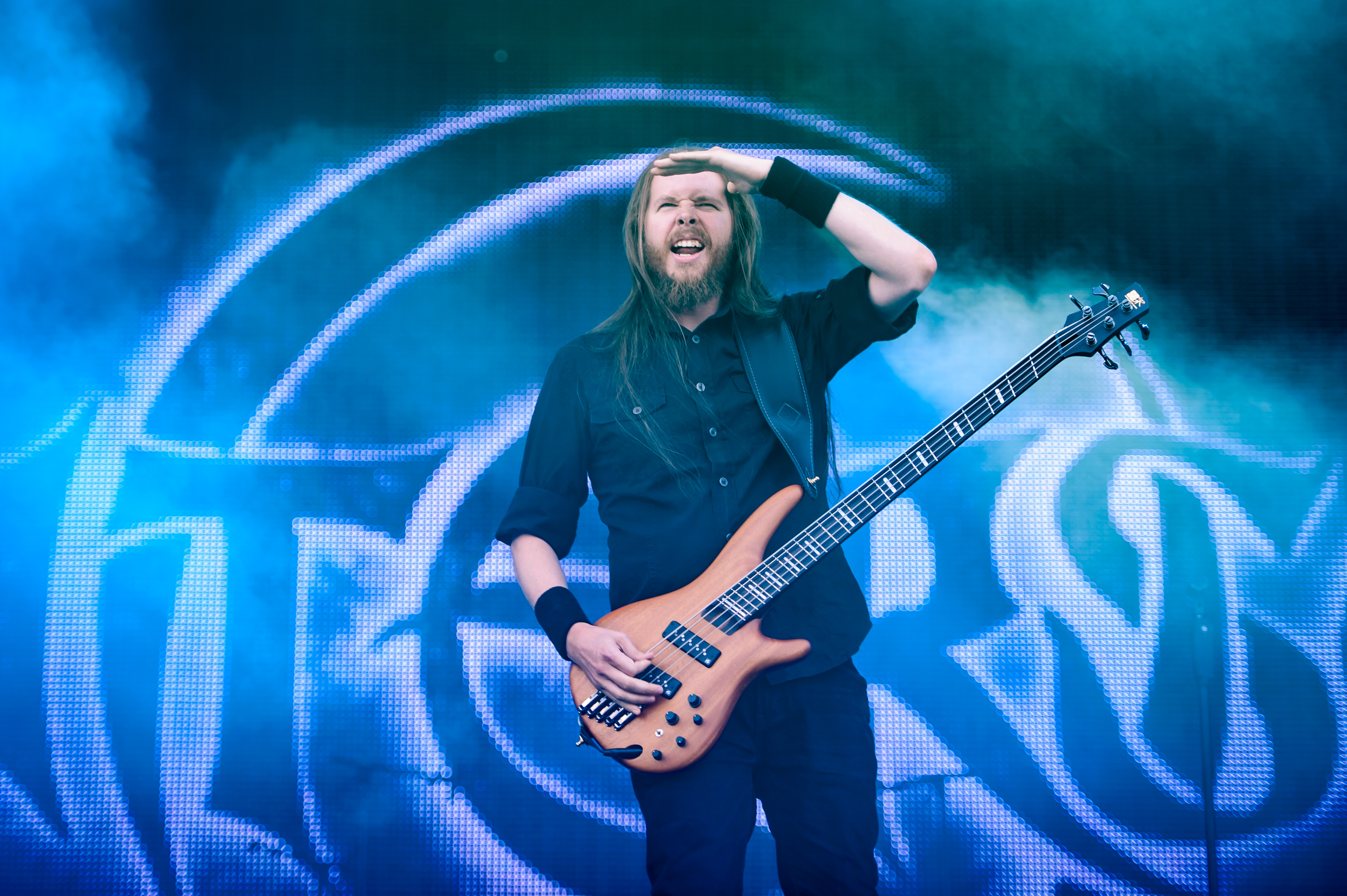 'Wacken Open Air 2018': 'Wintersun'